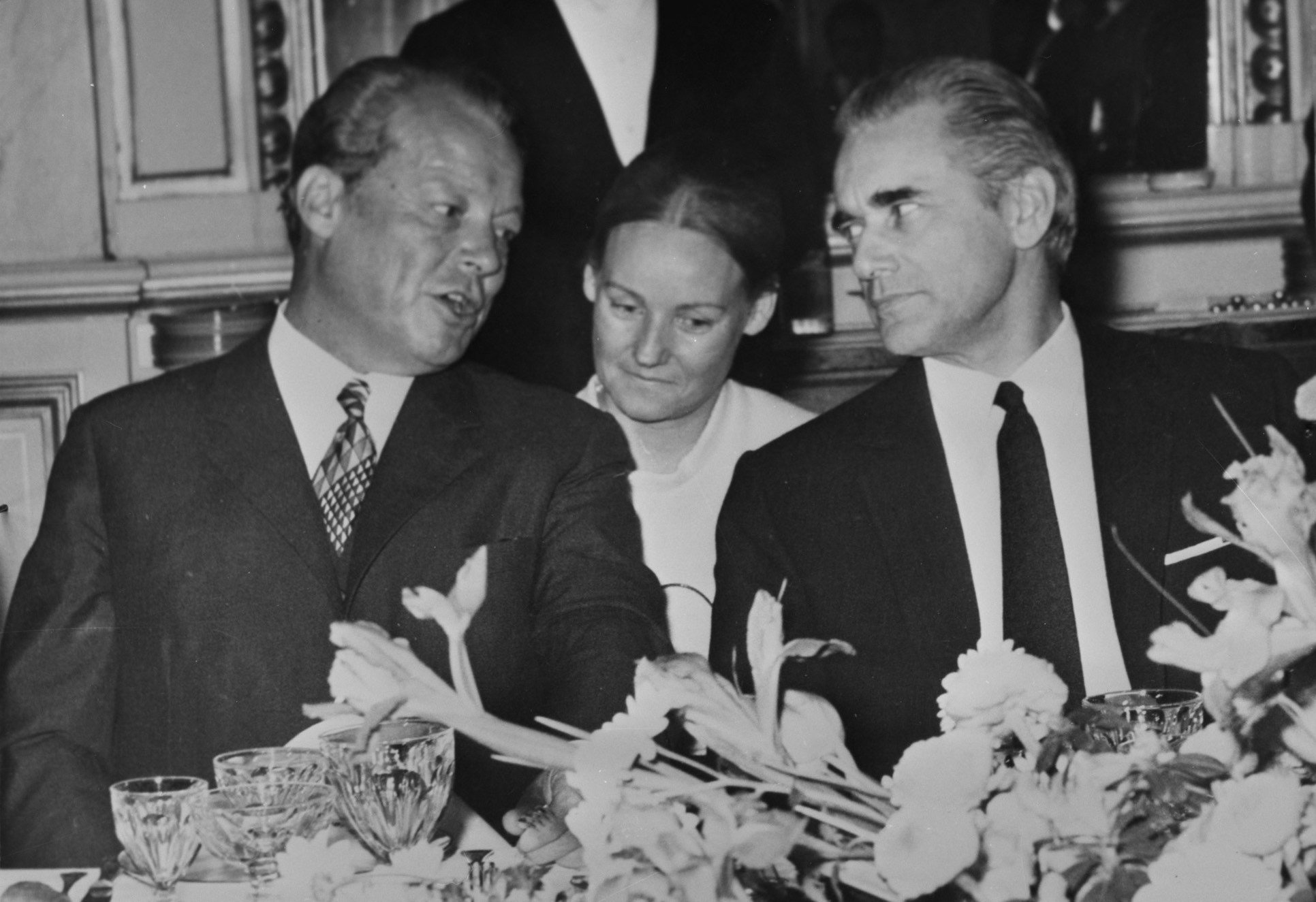 Collectie / Archief : Fotocollectie Anefo Reportage / Serie : [ onbekend ] Beschrijving : Bondskanselier Willy Brandt is in Parijs voor bespreking met president Pompidou ; (links) W. Brandt , rechts premier Chaban-Delmas aan lunch Datum : 26 januari 1971 Locatie : Frankrijk, Parijs Trefwoorden : bondskanseliers, premiers Persoonsnaam : Brandt, Willy, Chaban-Delmas Fotograaf : Fotograaf Onbekend / Anefo Auteursrechthebbende : Nationaal Archief Materiaalsoort : Negatief (zwart/wit) Nummer archiefinventaris : bekijk toegang 2.24.01.04 Bestanddeelnummer : 924-2093